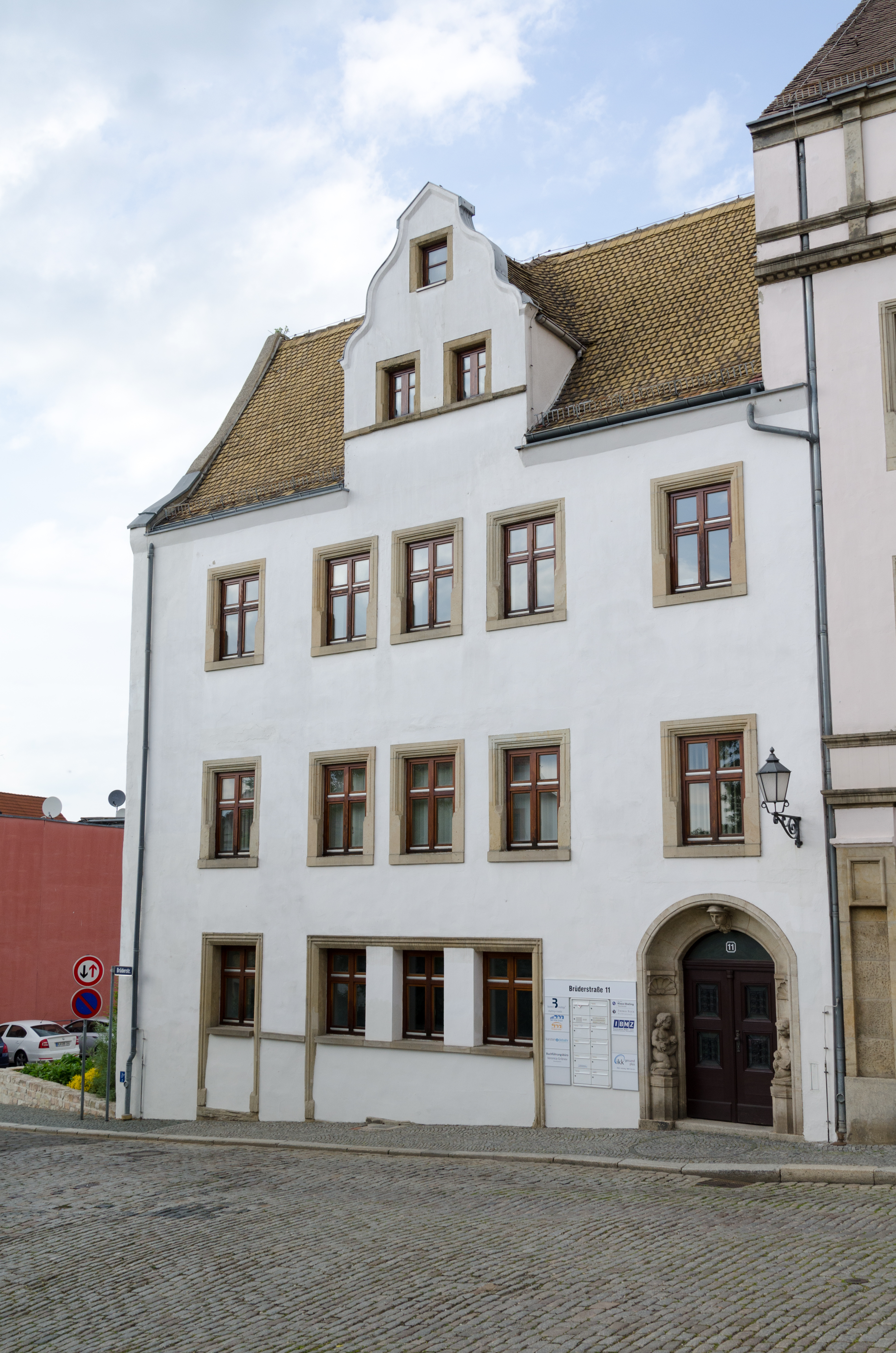 Zeitz, Brüderstraße 11